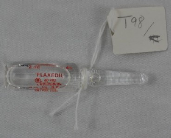 Una ampolleta del farmaco curariforme sintetico conocido como galamina y vendido bajo el nombre "FLAXEDIL".